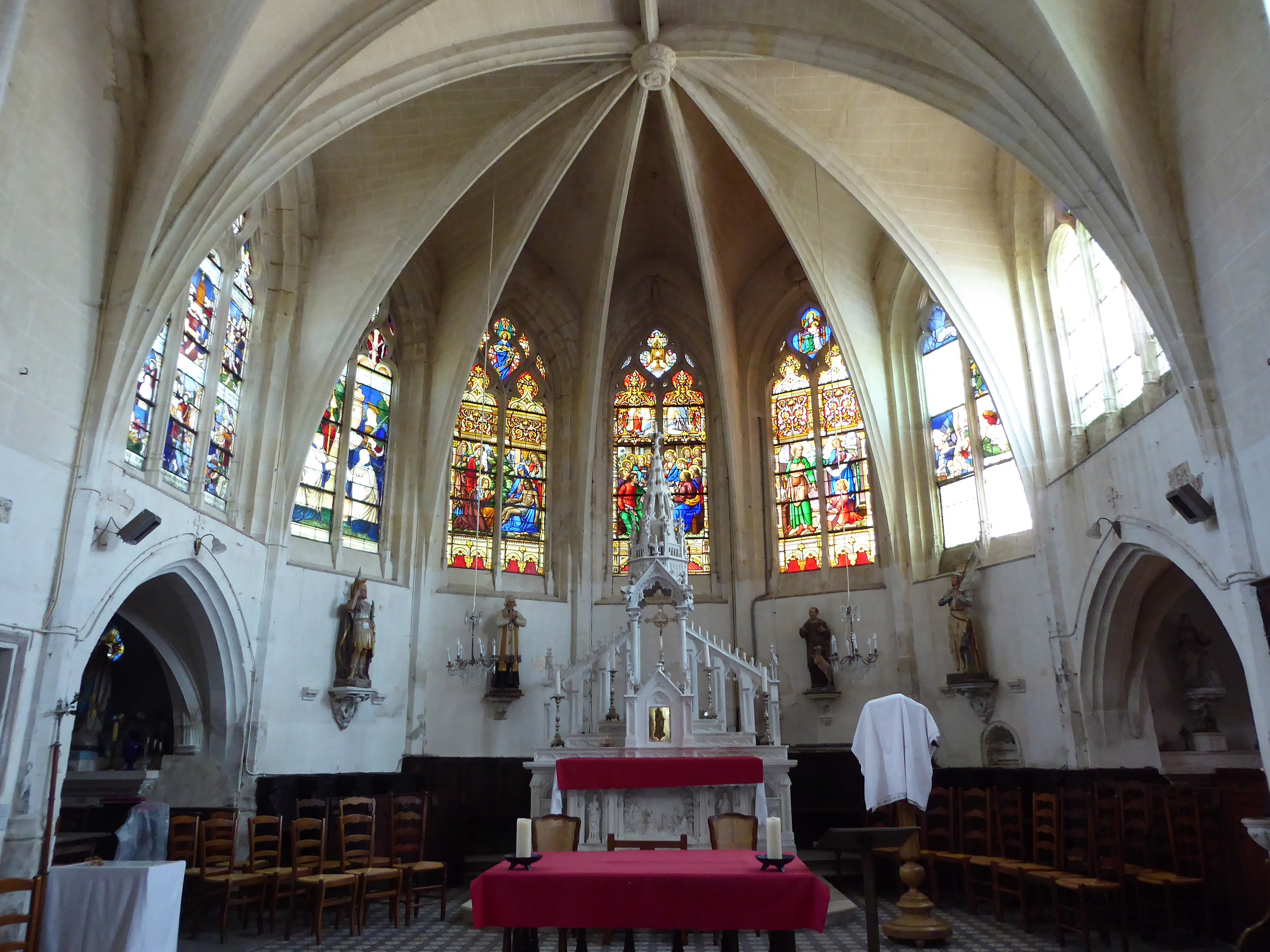 chœur de l'église Saint-Georges, Souancé-au-Perche, Eure-et-Loir, France.